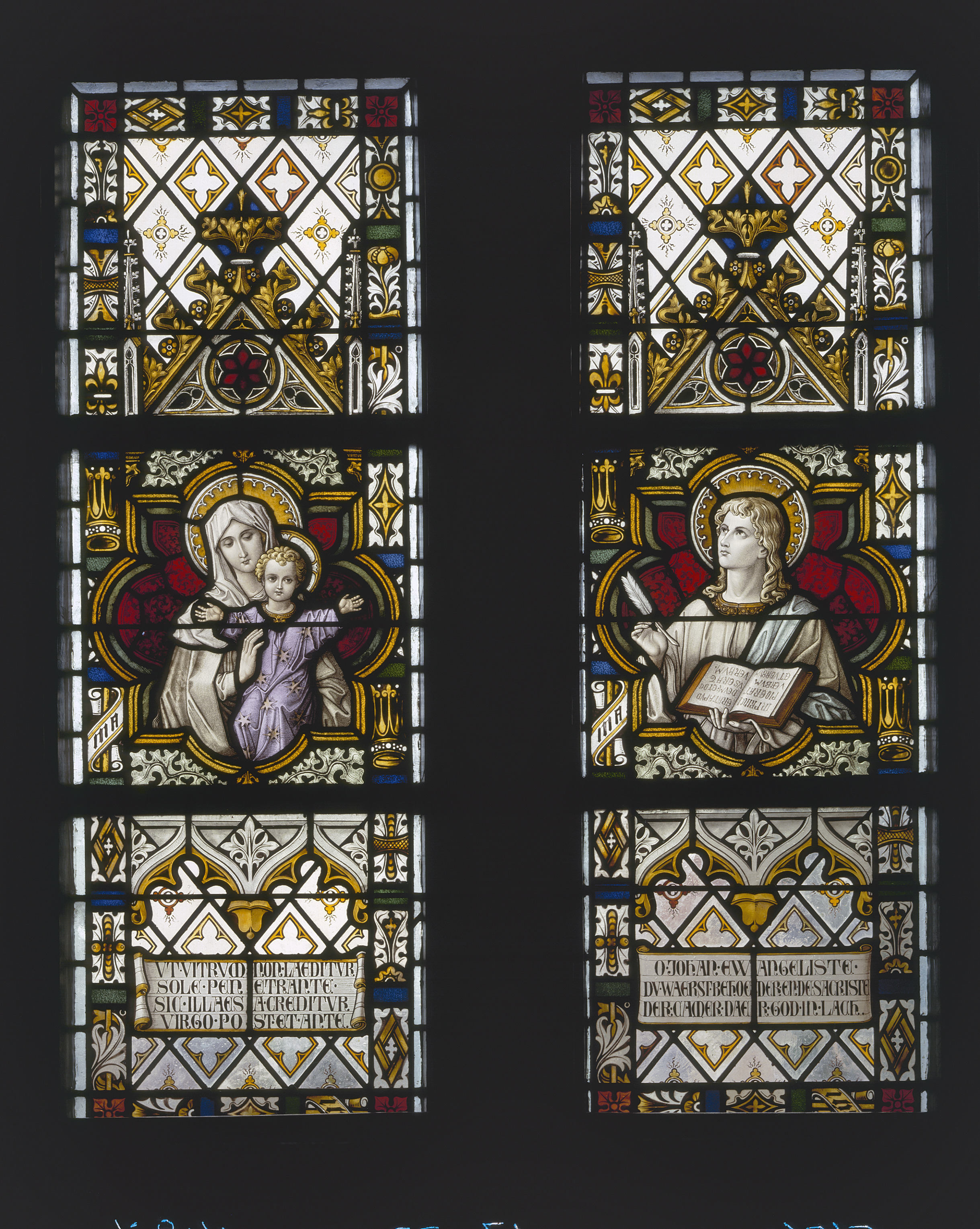 Rooms-katholieke Sint-Martinuskerk: Interieur sacristie, aanzicht gebrandschilderde glas-in-loodramen (opmerking: Gefotografeerd voor Glas in lood in Nederland 1817-1968)